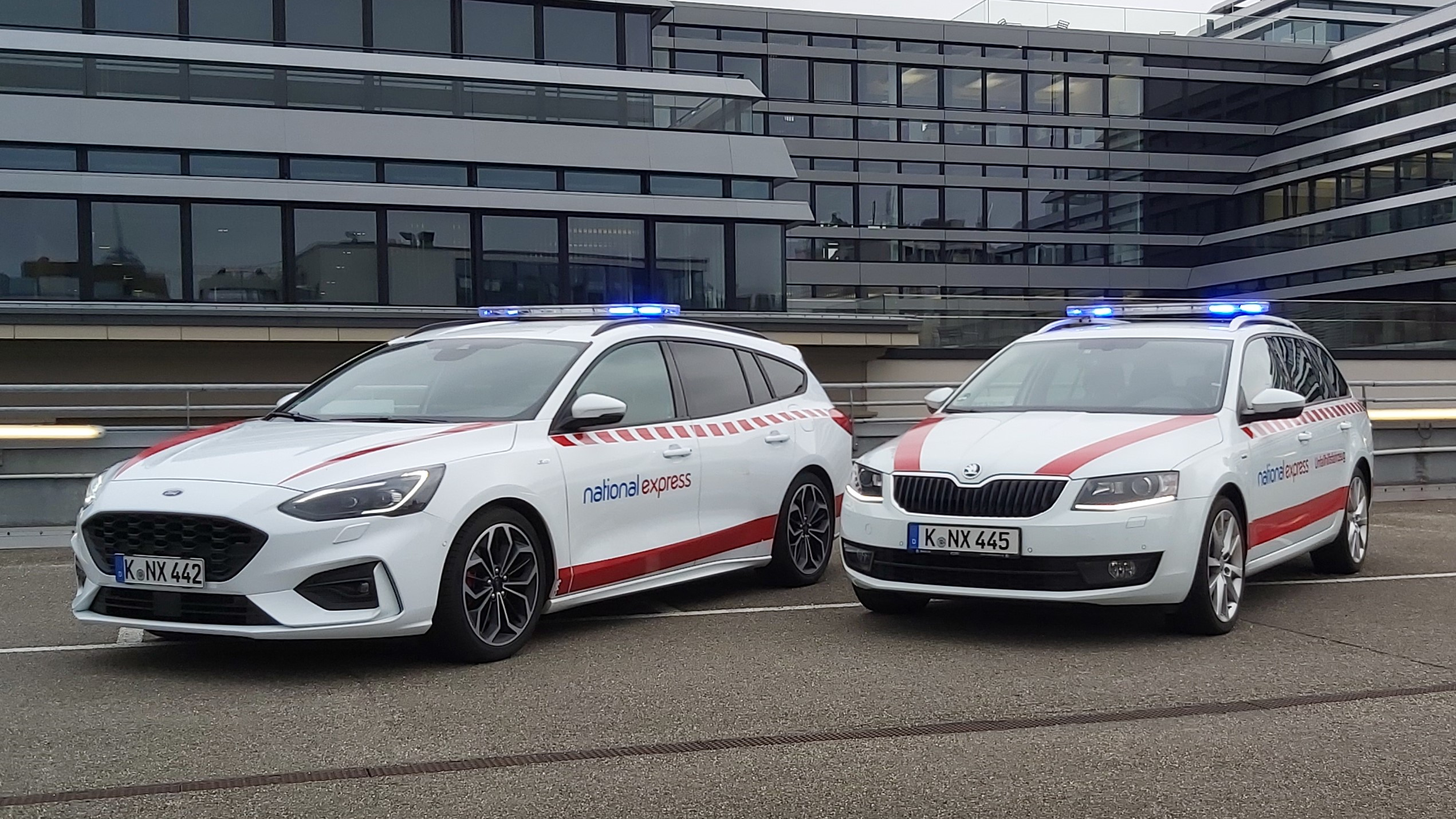 Fahrezug im Notdienst der National Express Rail GmbH